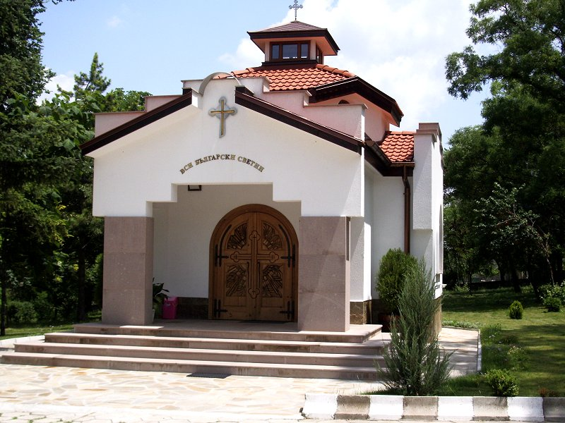 Автор на снимката е Васил Кънев.